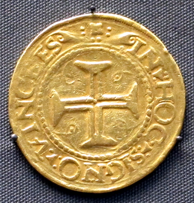 Portogallo, re joao II, moneta d'oro